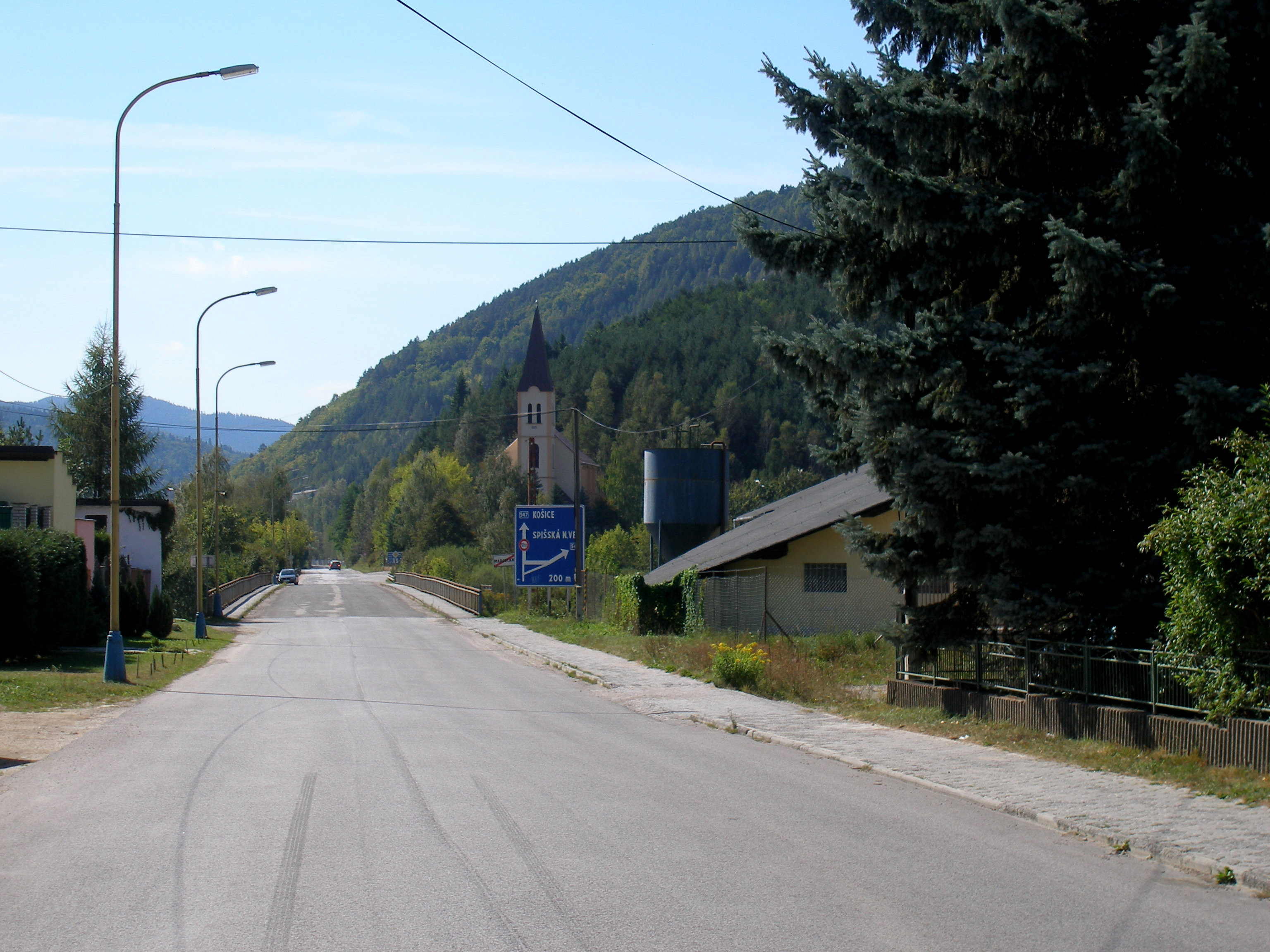 Spišská obec Margecany. Okres Gelnica.